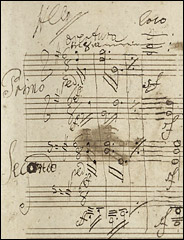 降B大調絃樂四重奏大賦格。